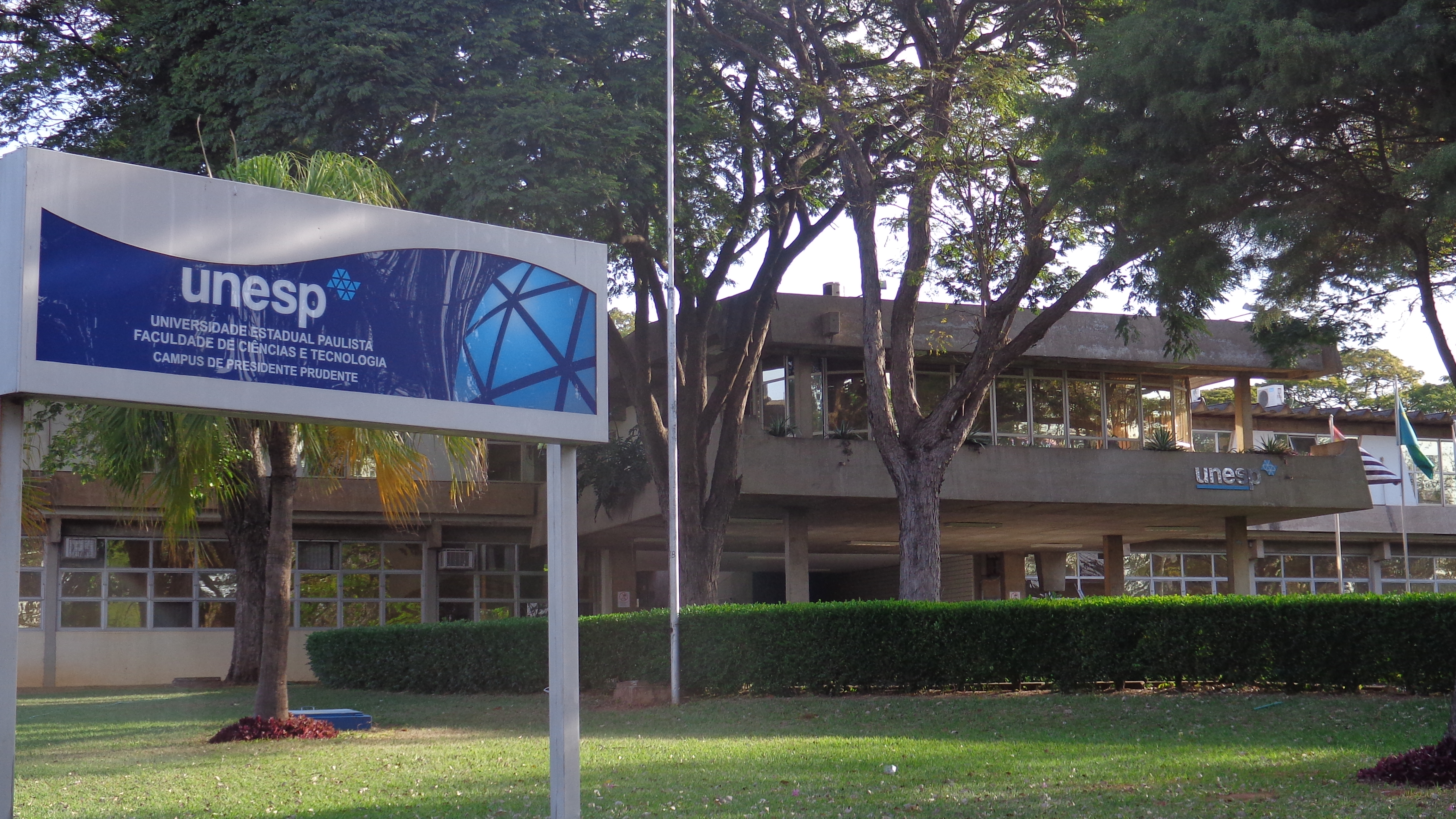 Entrada do Campus da Unesp em Presidente Prudente